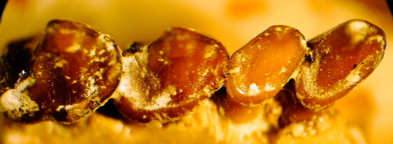 Chlororhysis knightensis Gazin, 1958